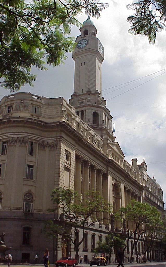 Vista exterior del Palacio de la Legislatura de la Ciudad de Buenos Aires